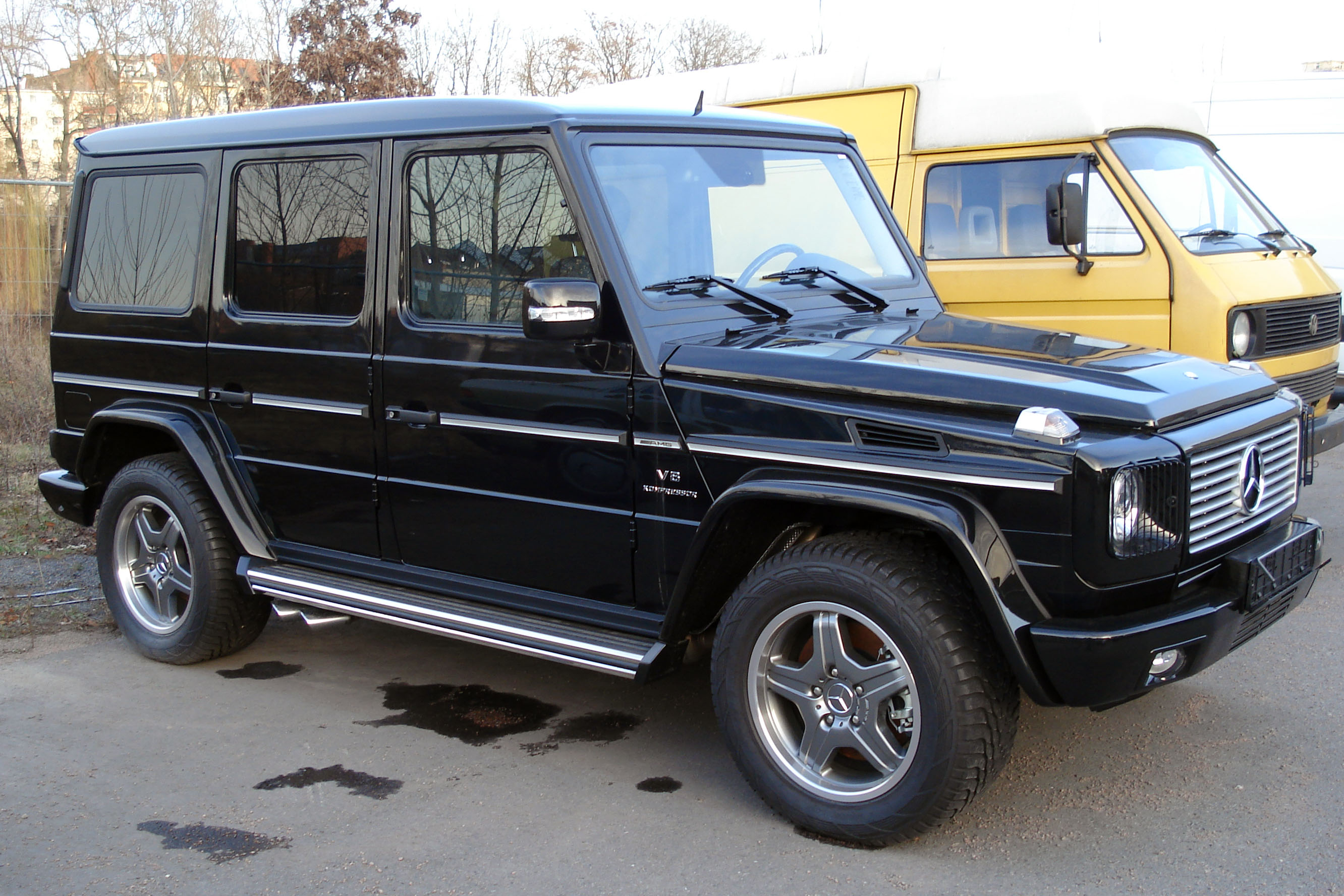 Mercedes G 55 AMG